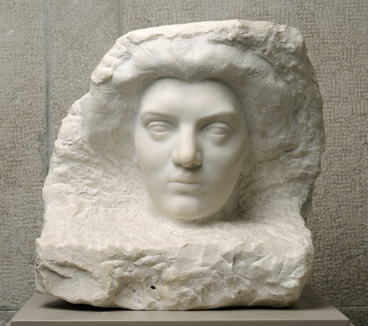 Statuette